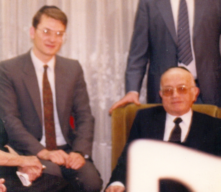 El Jajam Isaac Chehebar (derecha) junto a su alumno el rabino Isaac Sacca (izquierda)